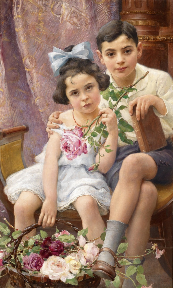 František Dvořák: Portrét sourozenců Siblingových